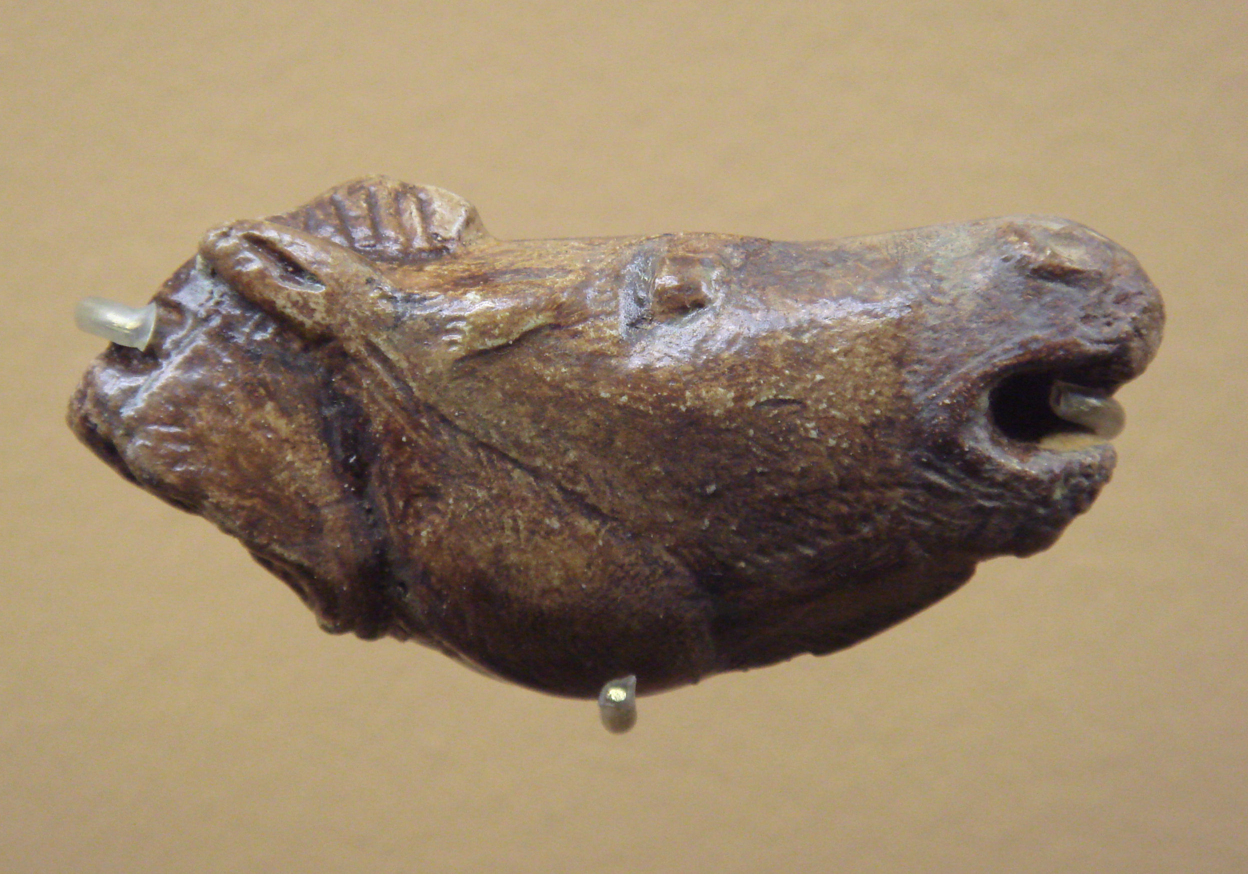 Mas d'Azil, France. Tête de cheval, bois ou os de cervidé ; Paléolithique. Musée d'archéologie nationale (Saint-Germain-en-Laye).